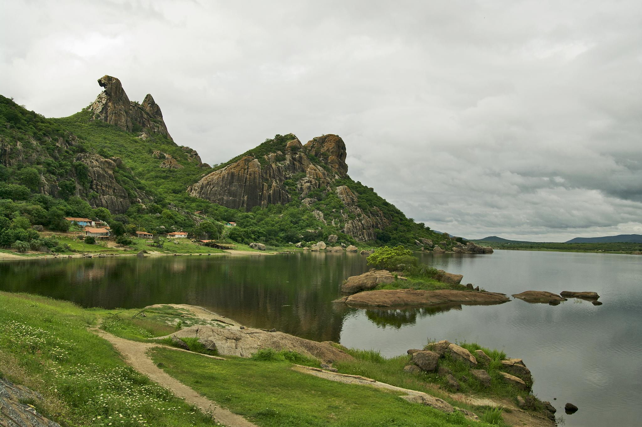 Açude do Cedro